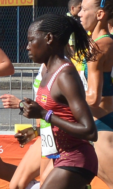 Passage du marathon des jeux olympiques de Rio 2016 dans le centre de Rio